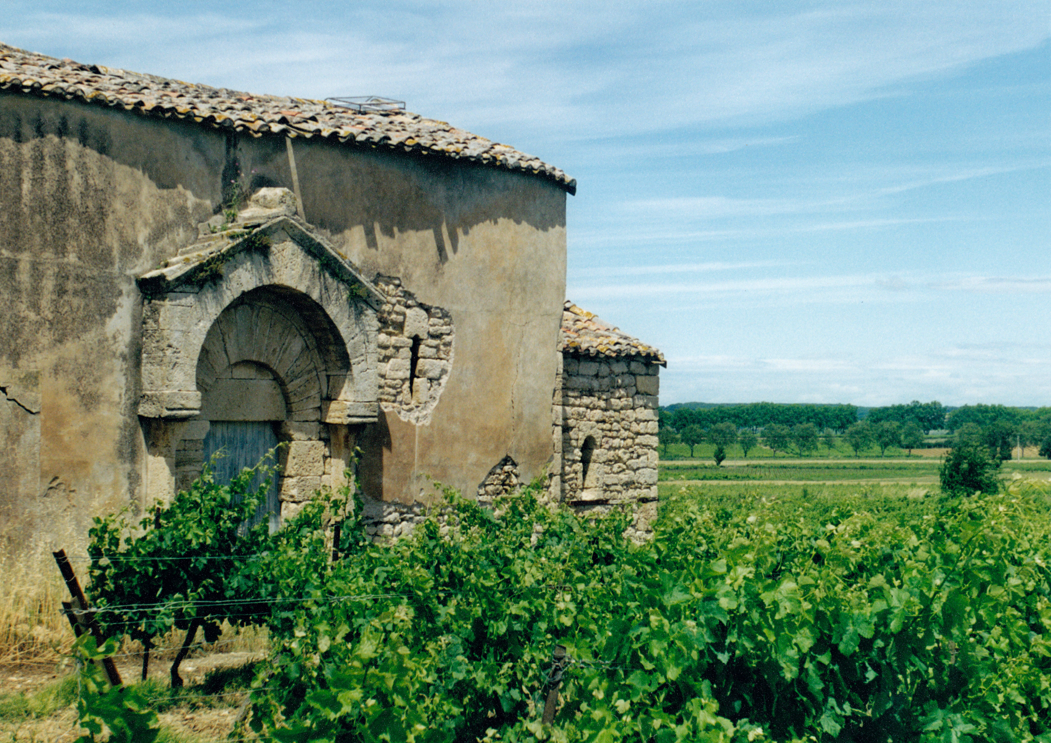 France - Languedoc - Saint-Nazaire-de-Roujan (préroman)